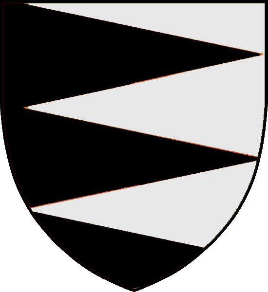 Vapensköld för danska adelsätten Ulfstand